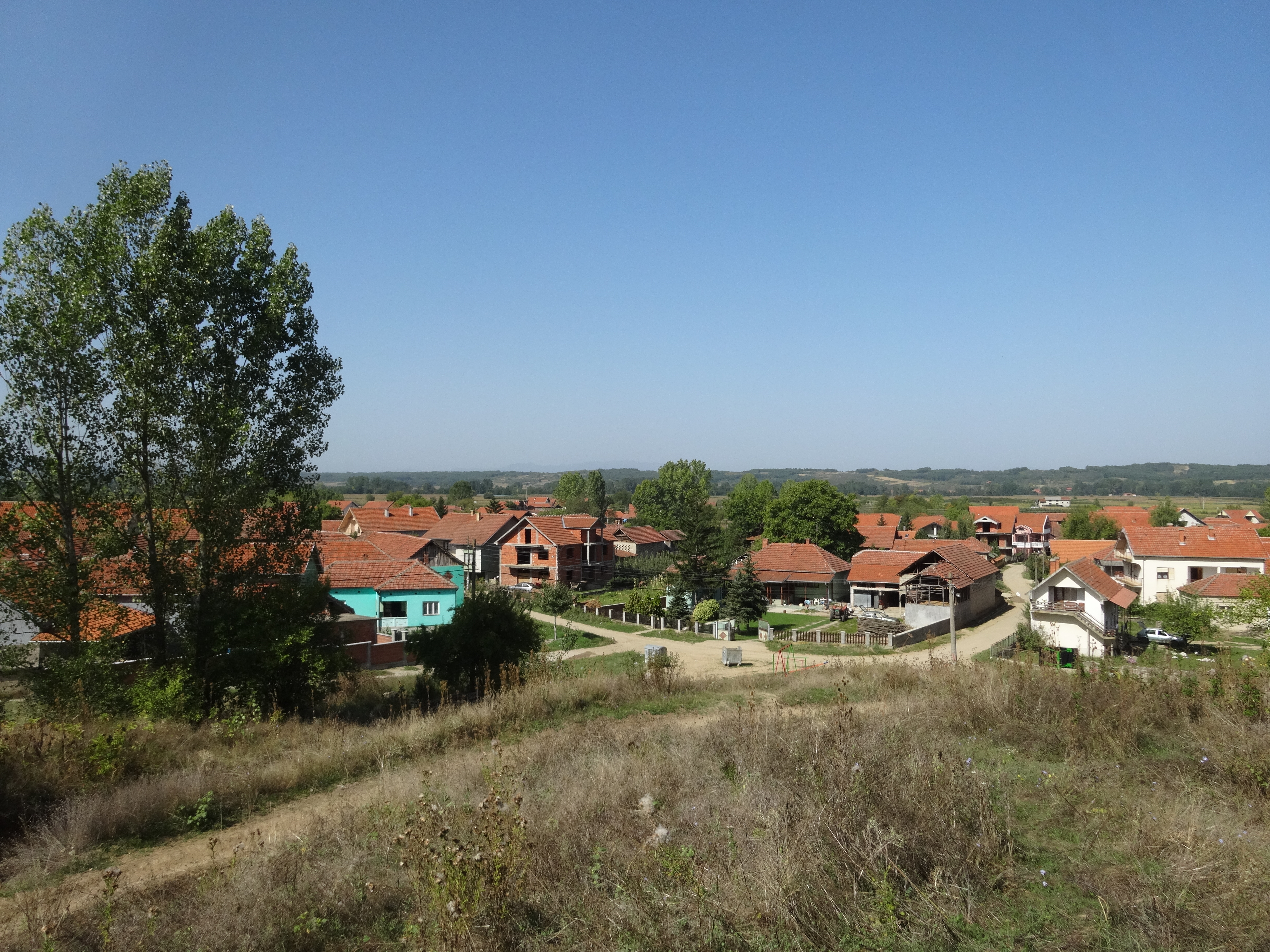 Presečina, Leskovac